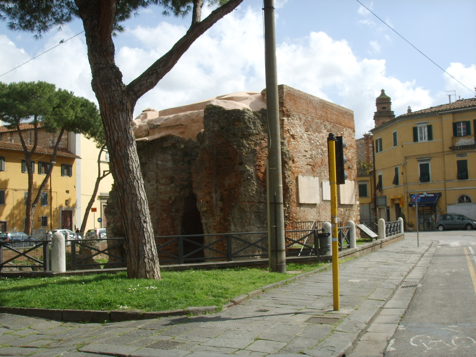 Bagni di nerone